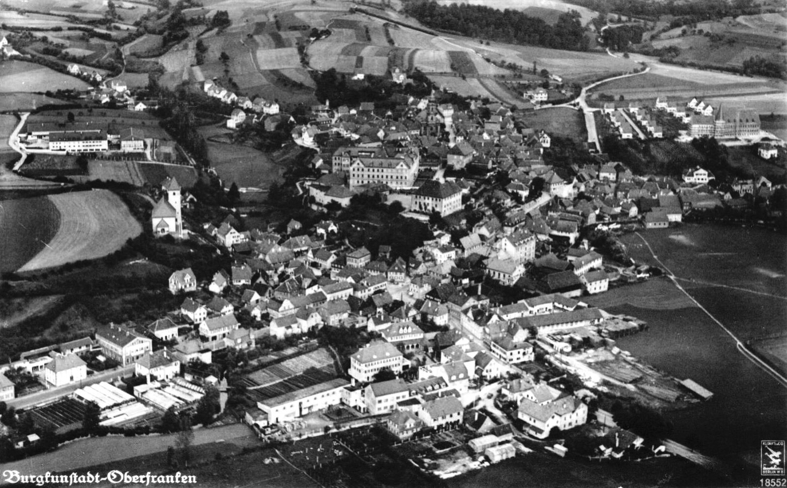 Luftbild Burgkunstadts von 1938. Gut zu Erkennen rechts oben die damals neu gebaute Volksschule und die "Schulsiedlung". Das weiße Haus mit dem hohen Giebel unterhalb der Schule ist das Gebäude der Apotheke Voigt.